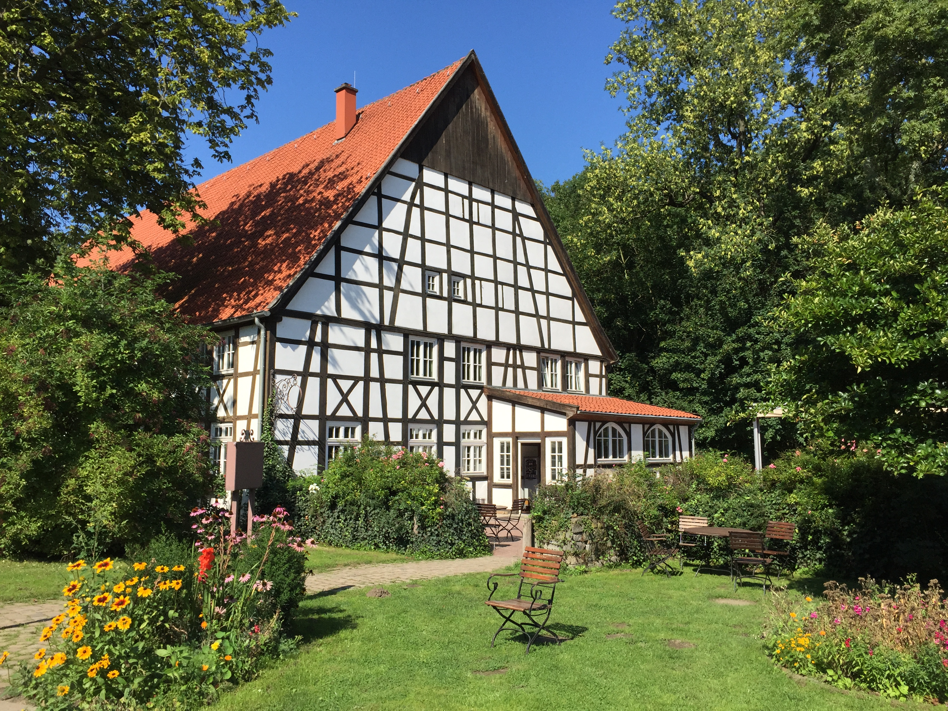 Schultenhof Dortmund-BaropThis is a photograph of an architectural monument., no. A 0053